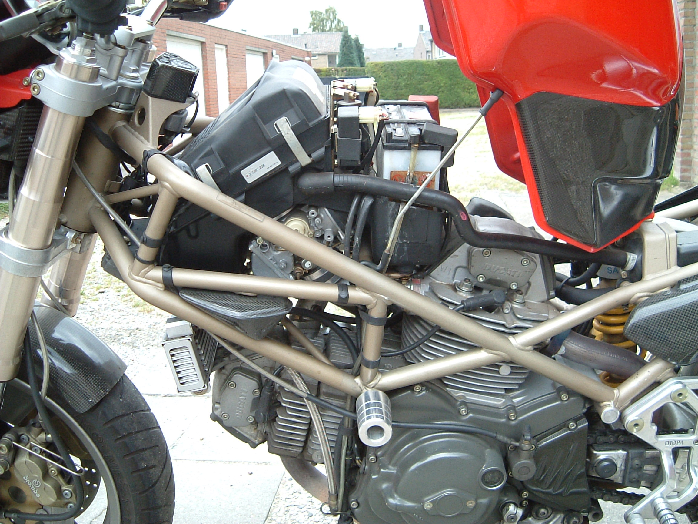 Toestemming van Huibert Raemakers